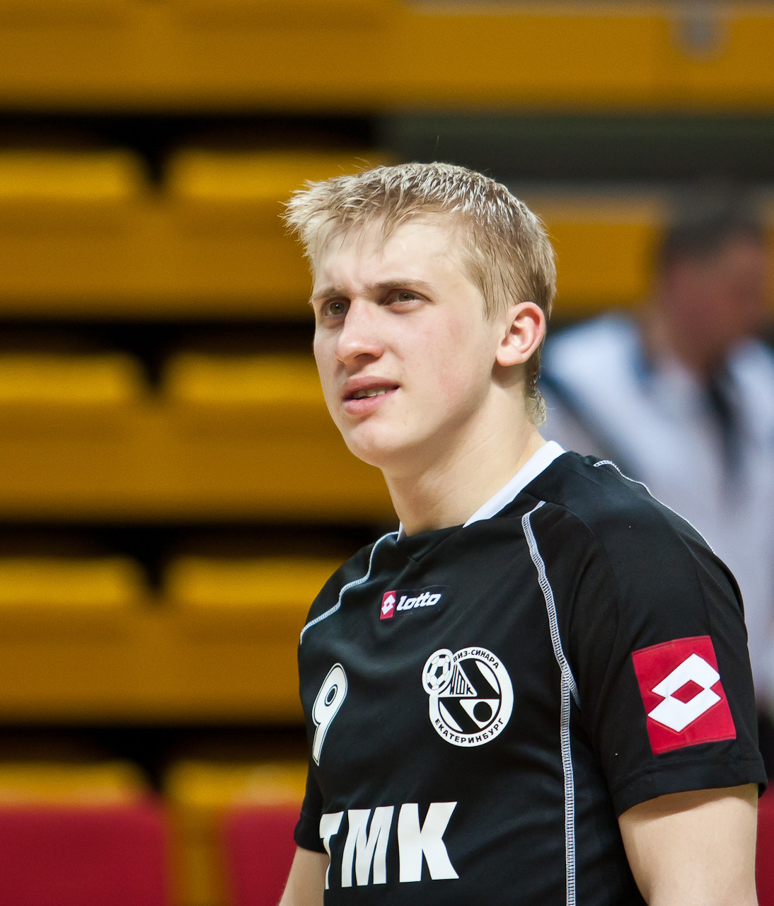 Сергей Абрамов